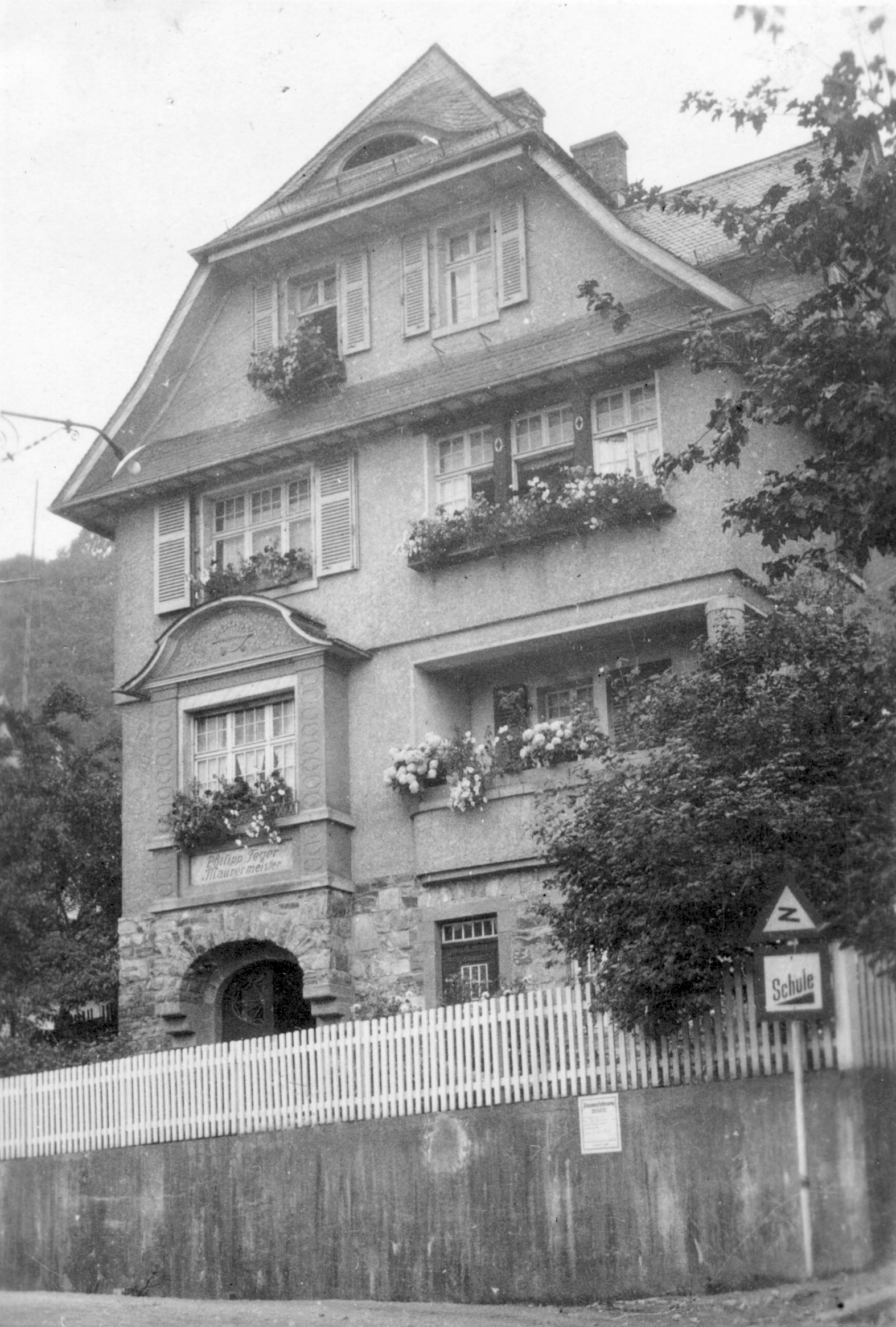 Haus Kronberger Straße 3-5 in Falkenstein/Taunus, erbaut 1912. Geburts-und Elternhaus von Walter Mayer (Physiker)